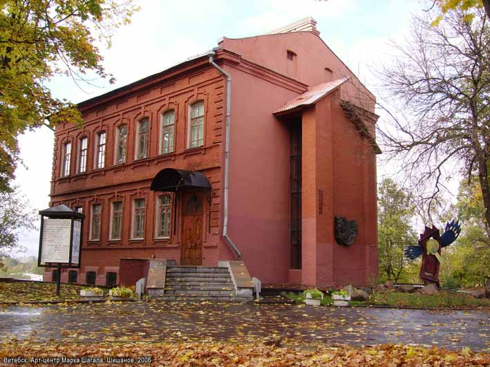 Арт-цэнтр Марка Шагала, Віцебск